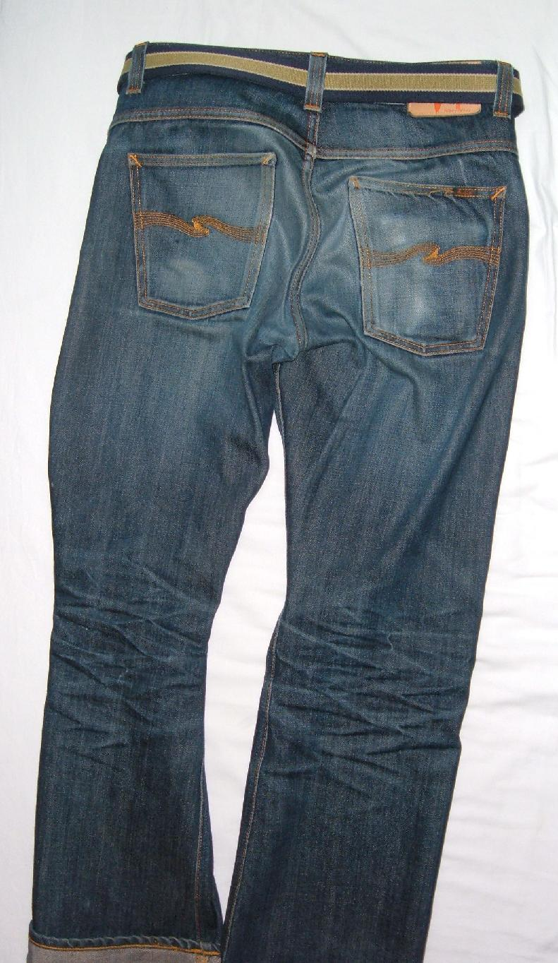 Gedragen Nudie Jeans (Regular Ralf).